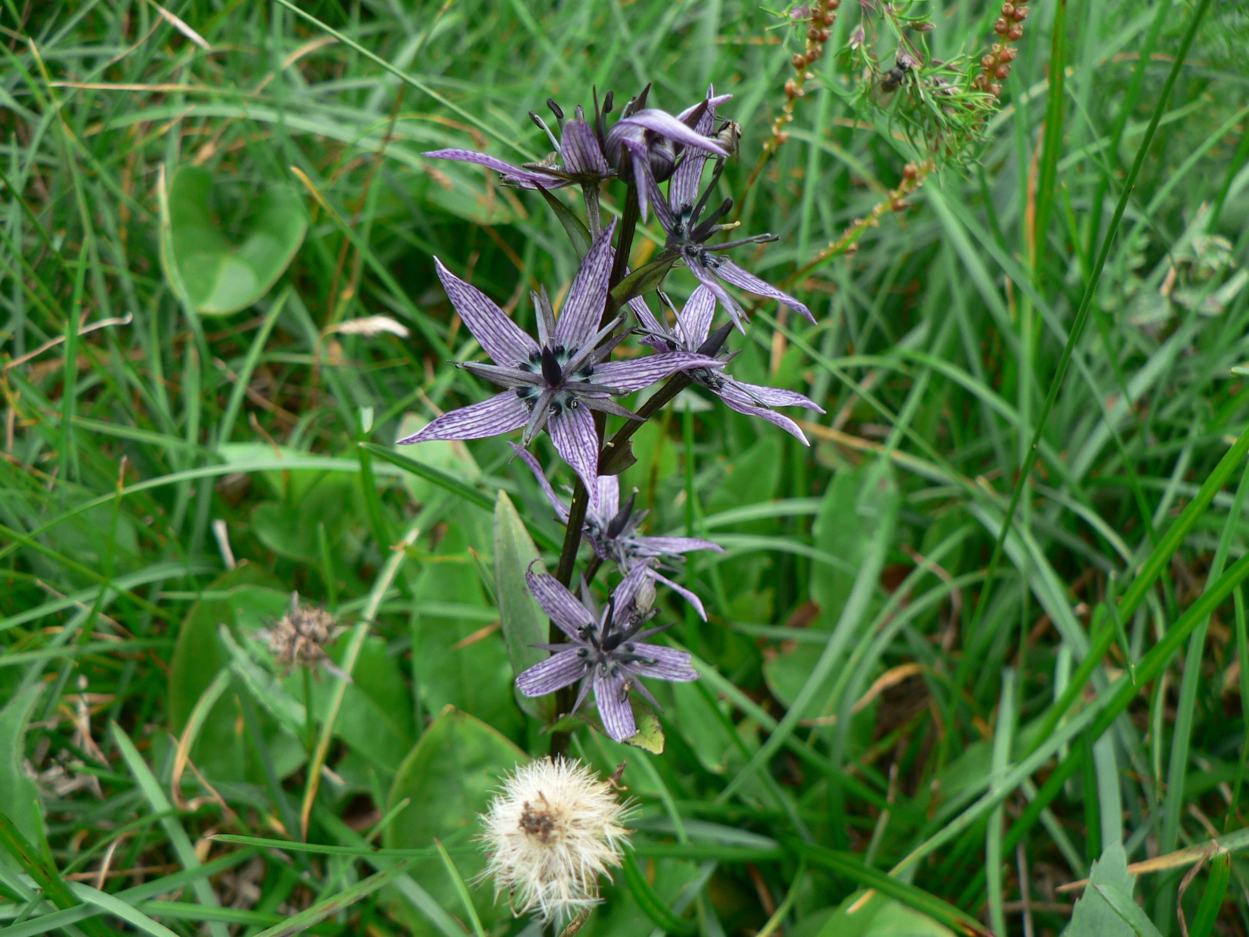 Kropenáč vytrvalý